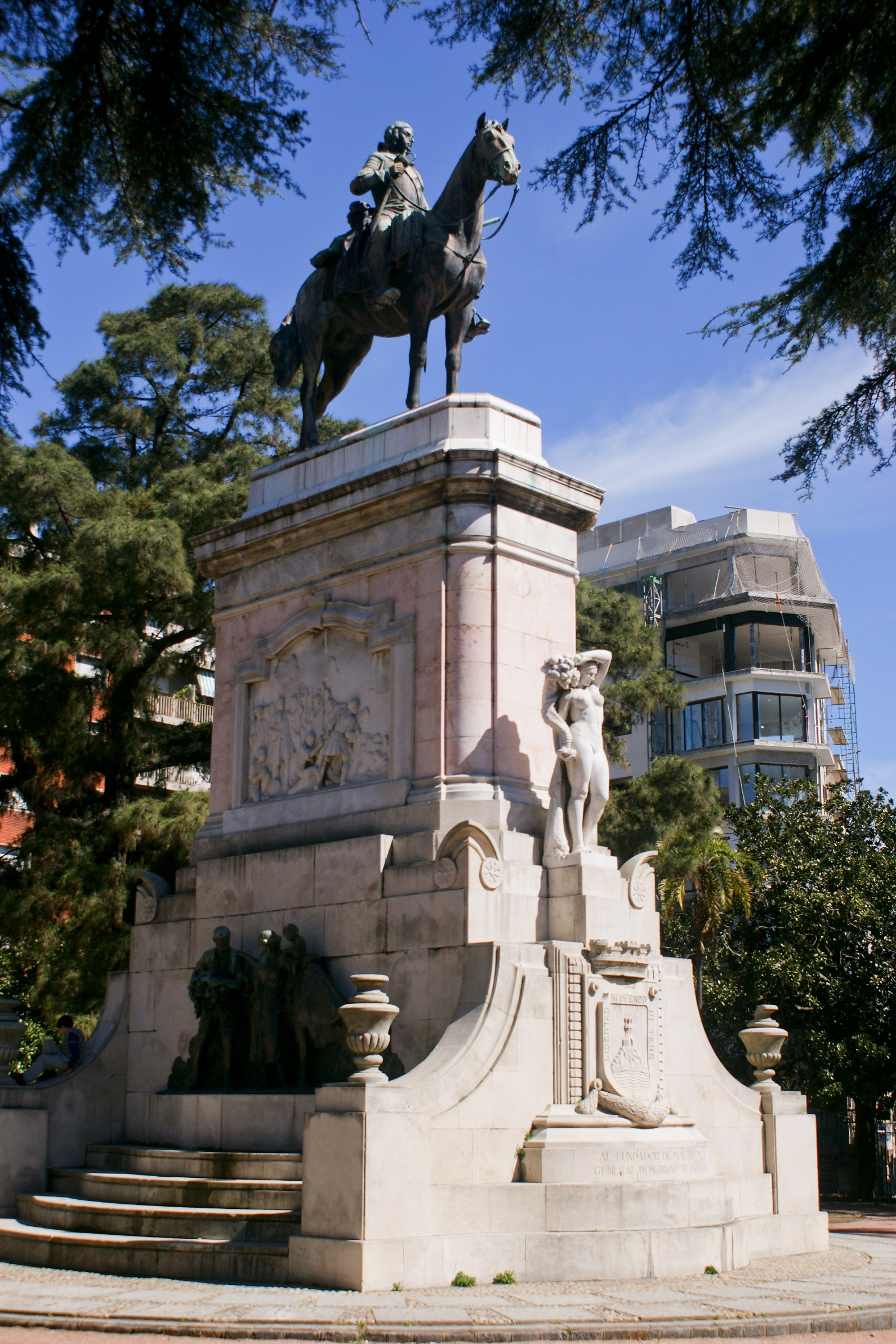 Bruno Mauricio de Zabala. Ubicada en el departamento de Montevideo